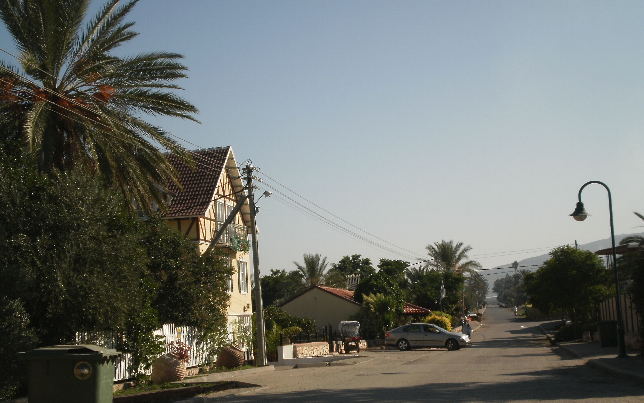 Yavne'el, Israel יבנאל, ישראל